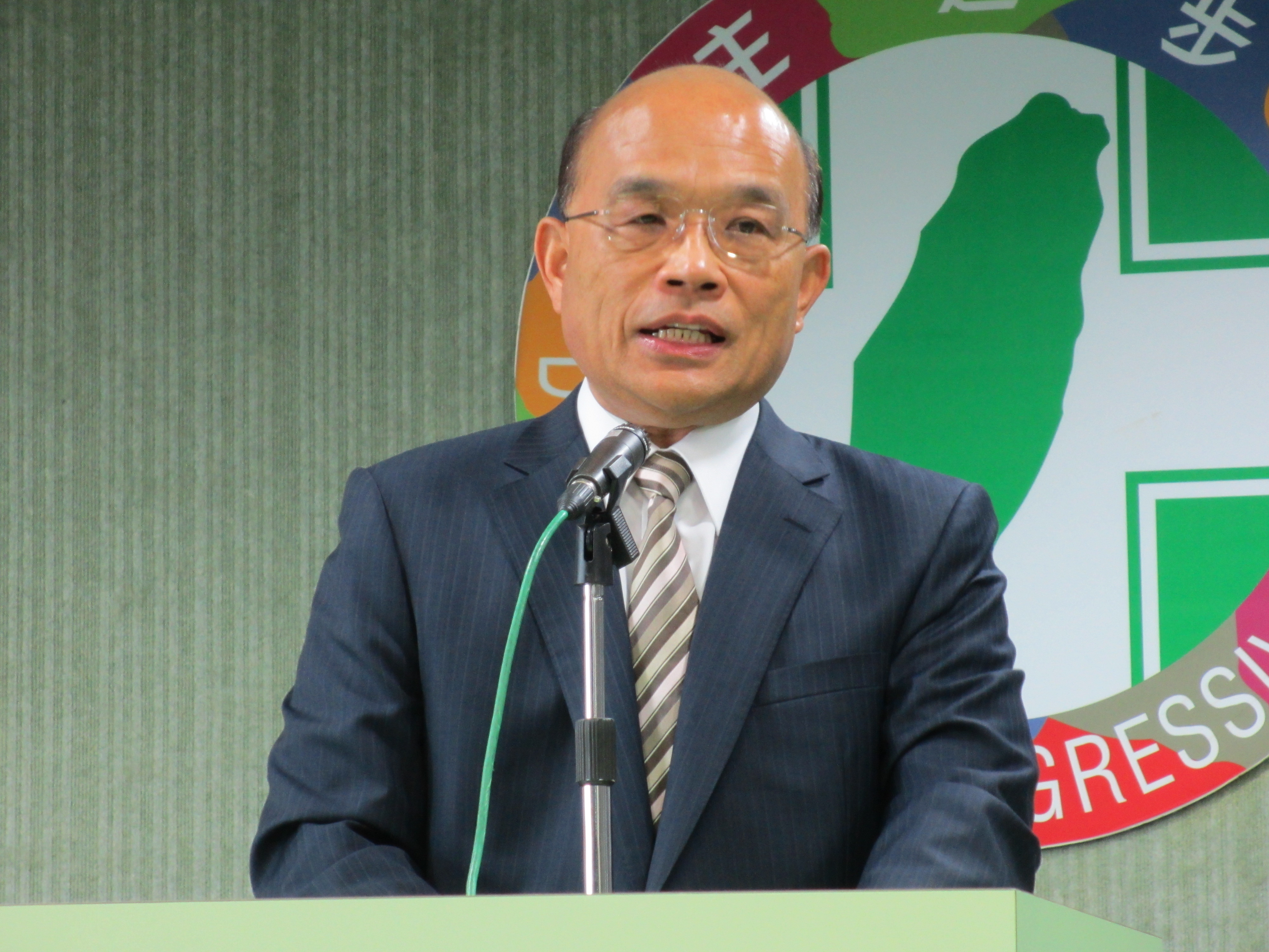 中文（台灣）: 民進黨主席蘇貞昌(美國之音張永泰拍攝)